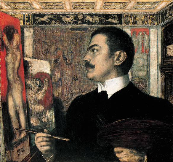 Self-portrait